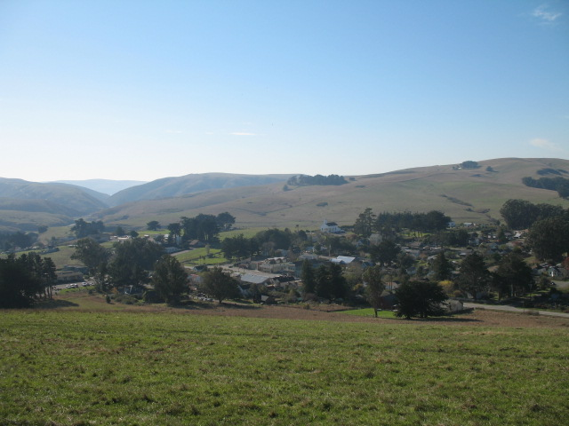 Tomales, CA.